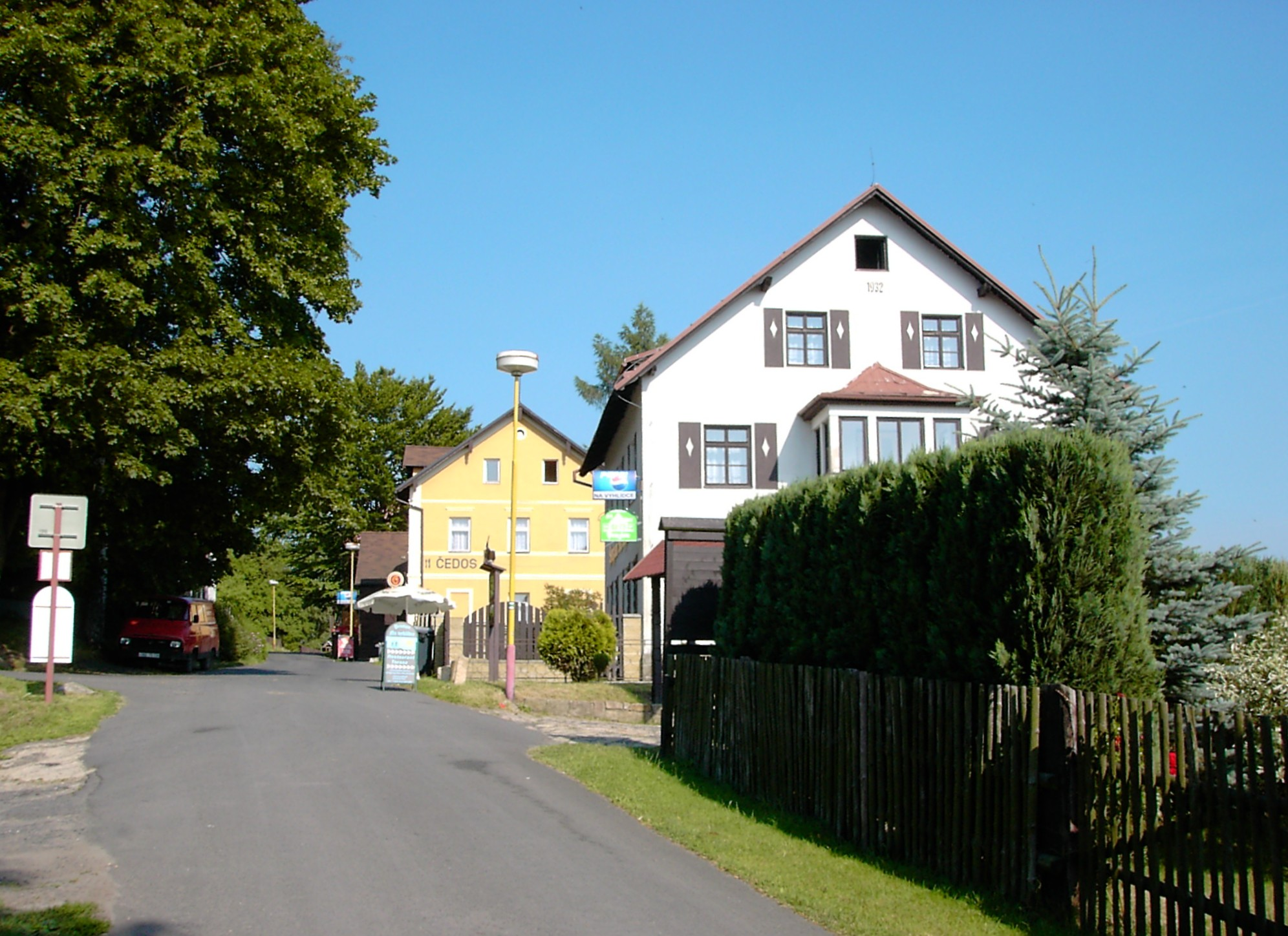 Mezná, obec Hřensko. Penzion Na Vyhlídce (čp. 80) a ČEDOS (čp. 61).